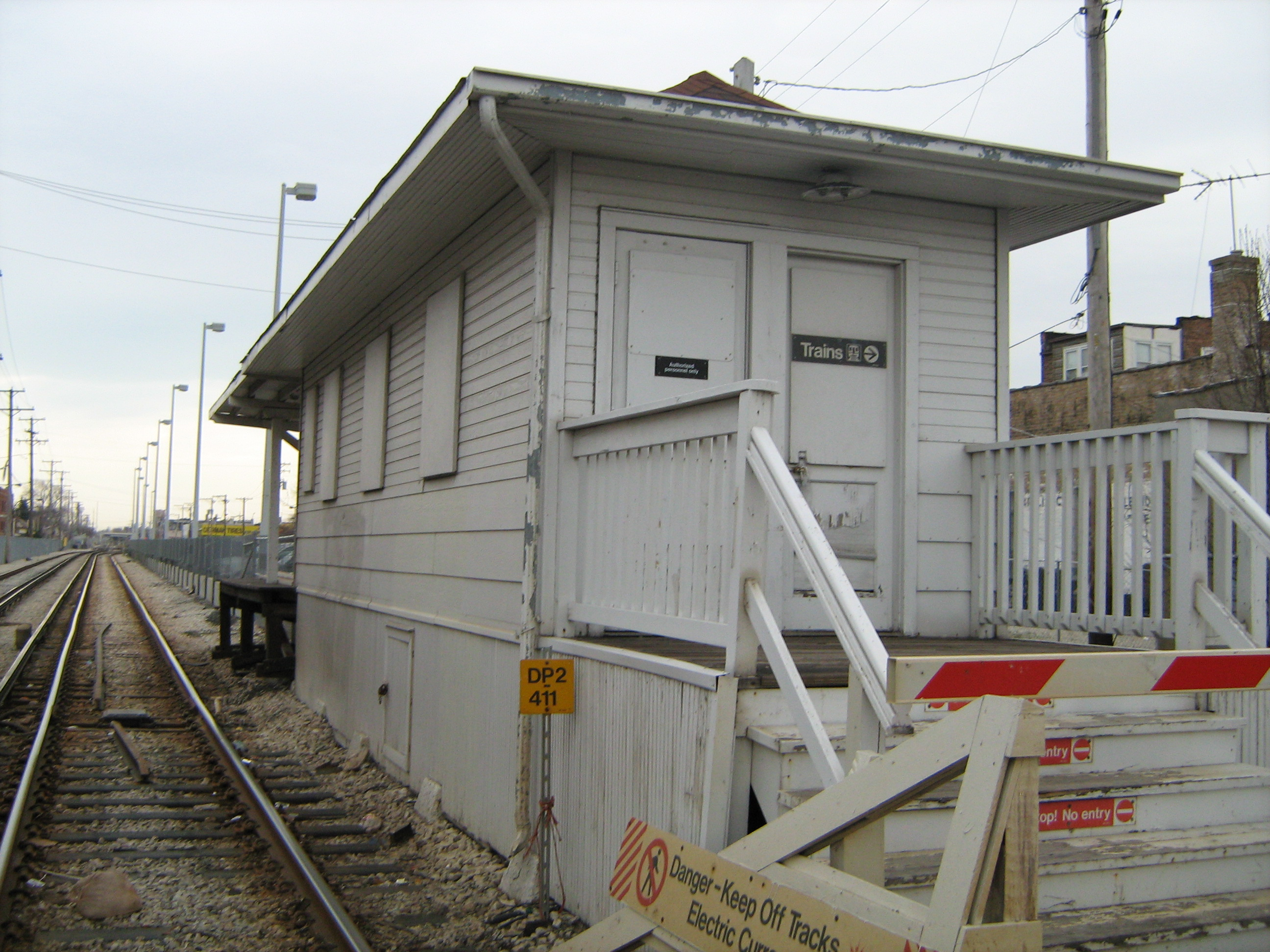 Laramie Avenue and 21st Place (5200W/2200S) 2130 S. Laramie Ave. Cicero, IL 60804 Pink Line (Former) Blue Line (Former)